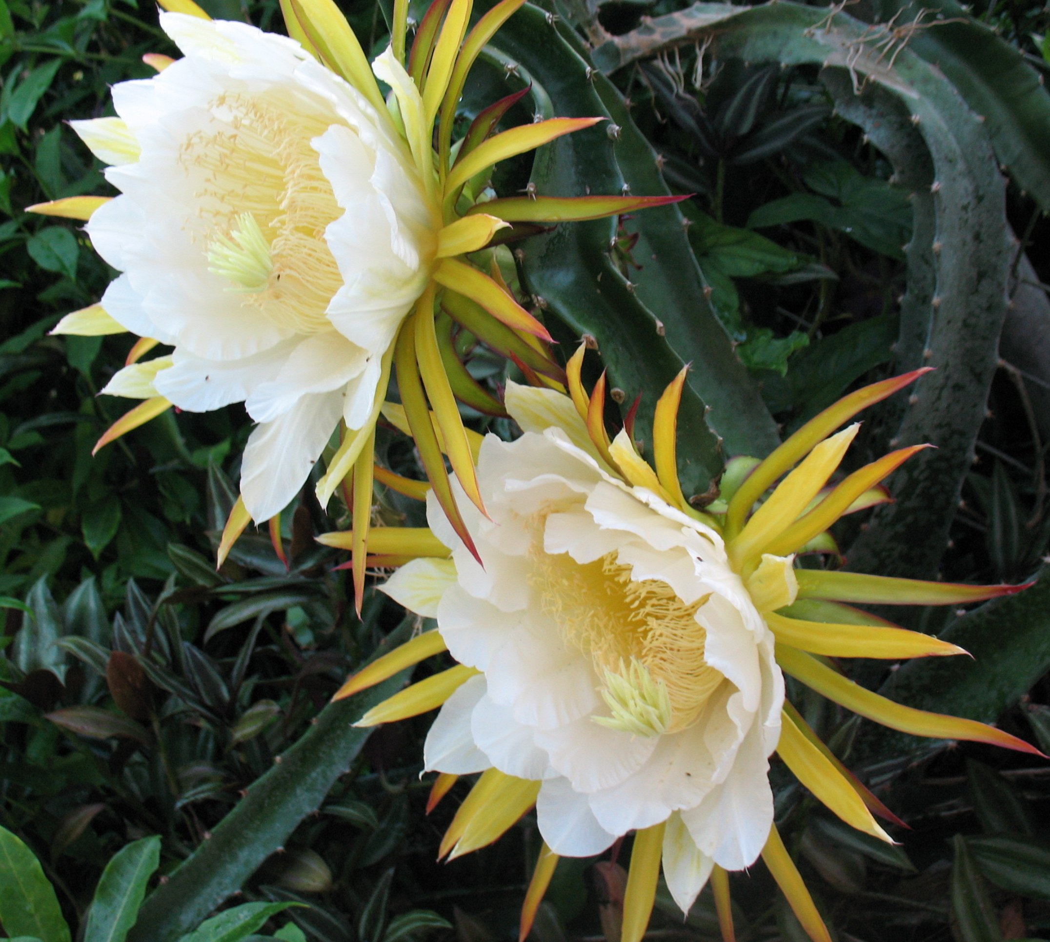 Hylocereus costaricensis SOOC